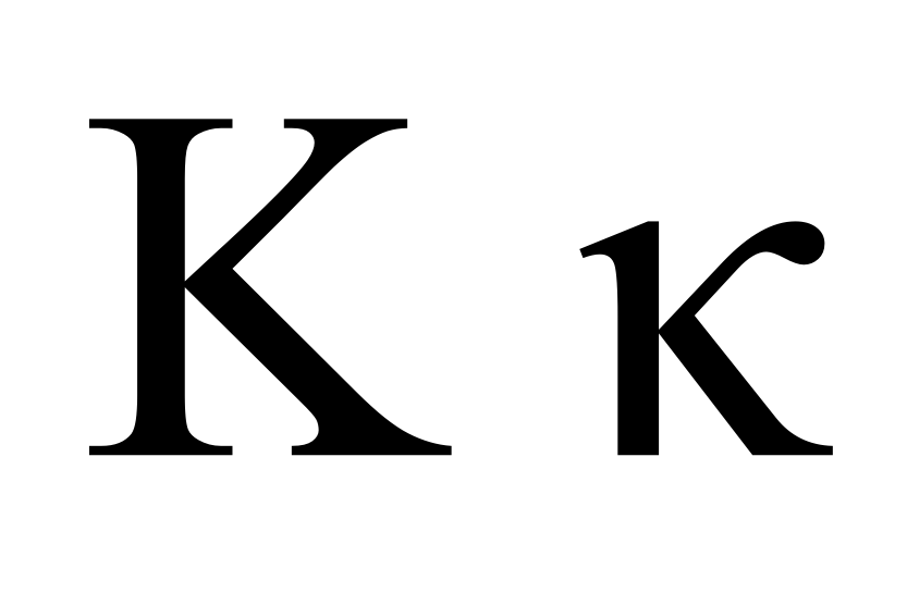 greek letter kappa